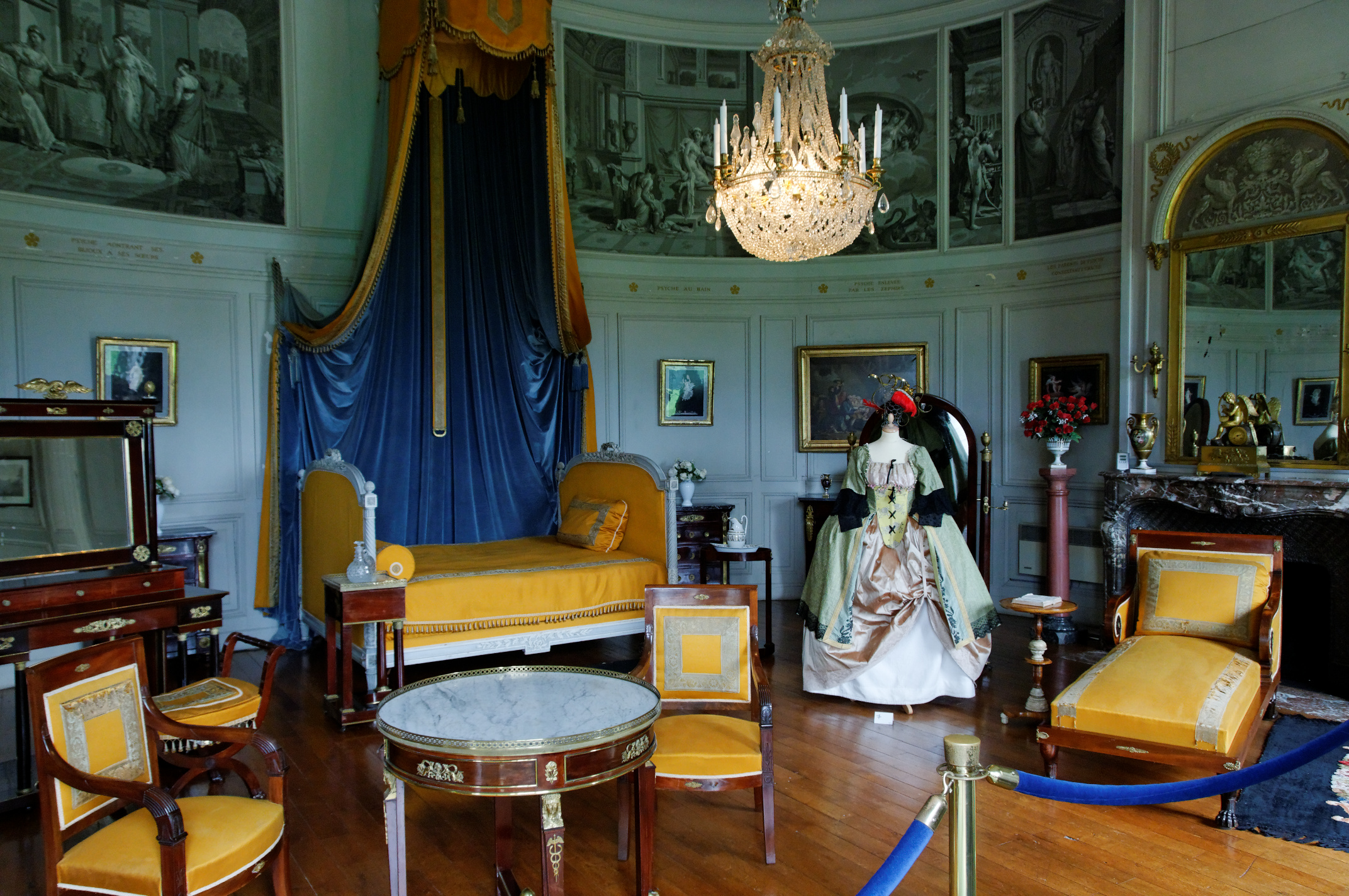 Château de Valençay, la Chambre du roi d'Espagne, Valençay, Indre, France